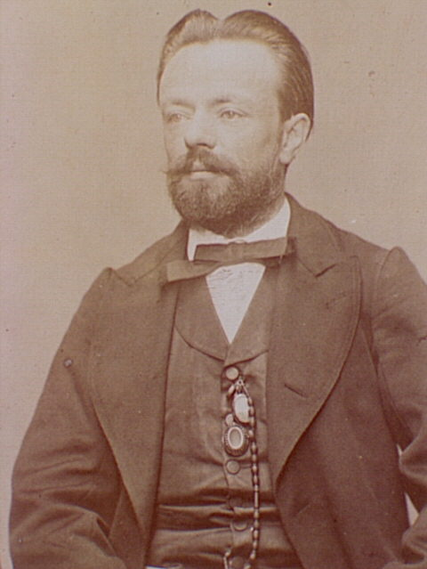 Raoul Urbain (1837-1902)